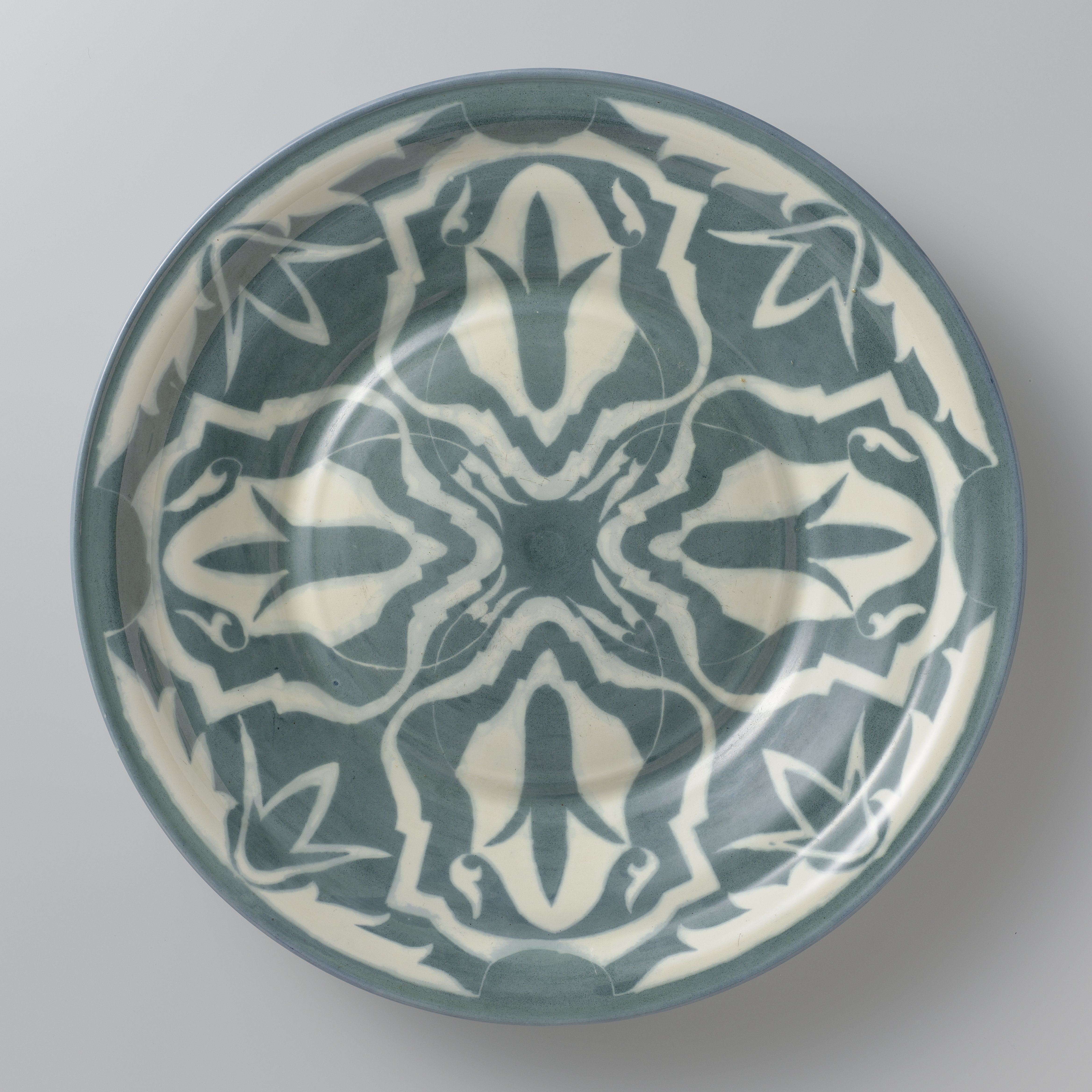 IdentificatieTitel(s): Bord met gestileerd decor in blauwObjecttype: bord (vaatwerk) Objectnummer: BK-1973-63Opschriften / Merken: merk: ‘Ontwerp. // Lion Cachet // met was. // proef blauw.// 12 Januari 1931. Hv.L. (alles in zwart)’ (Hv.L. is voor Henri van Lerven)Omschrijving: Bord van aardewerk met gestileerd decor in blauw, ook de achterkant.VervaardigingVervaardiger: ontwerper: Carel Adolph Lion Cachetvervaardiger: N.V. Plateelbakkerij RamPlaats vervaardiging: ArnhemDatering: 1931Materiaal: aardewerk Afmetingen: h 5,1 cm. × d 41,0 cm. Verwerving en rechtenVerwerving: aankoop 1973Copyright: Publiek domein